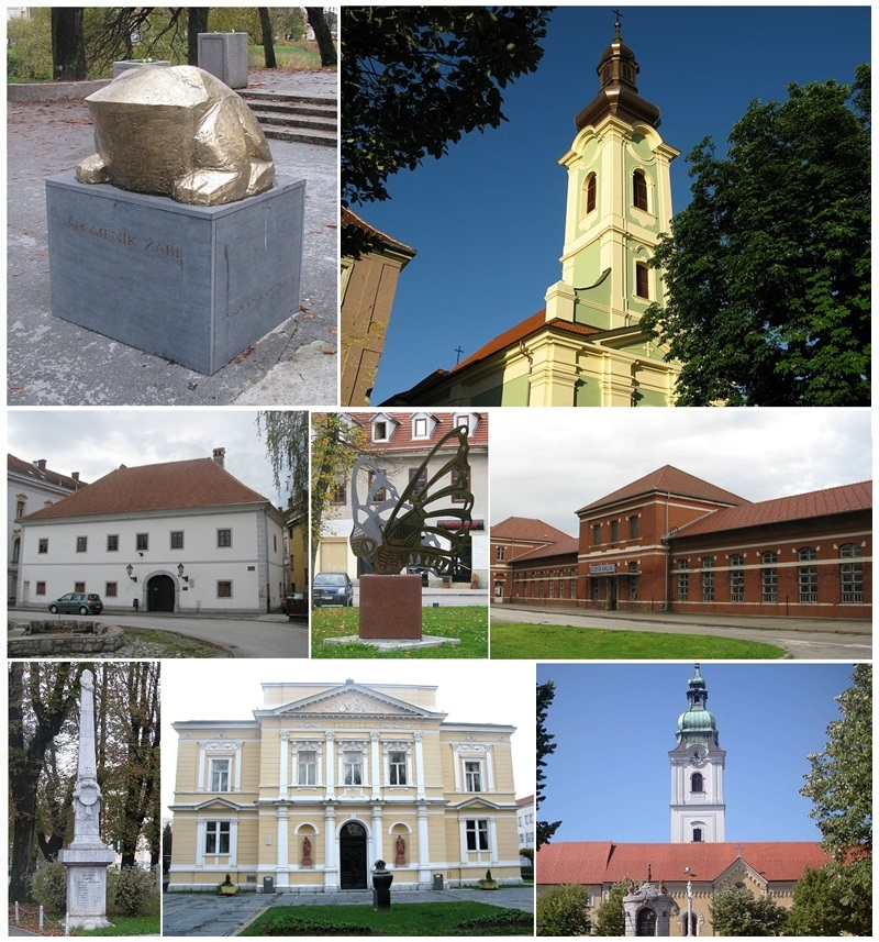 Slike iz Karlovca